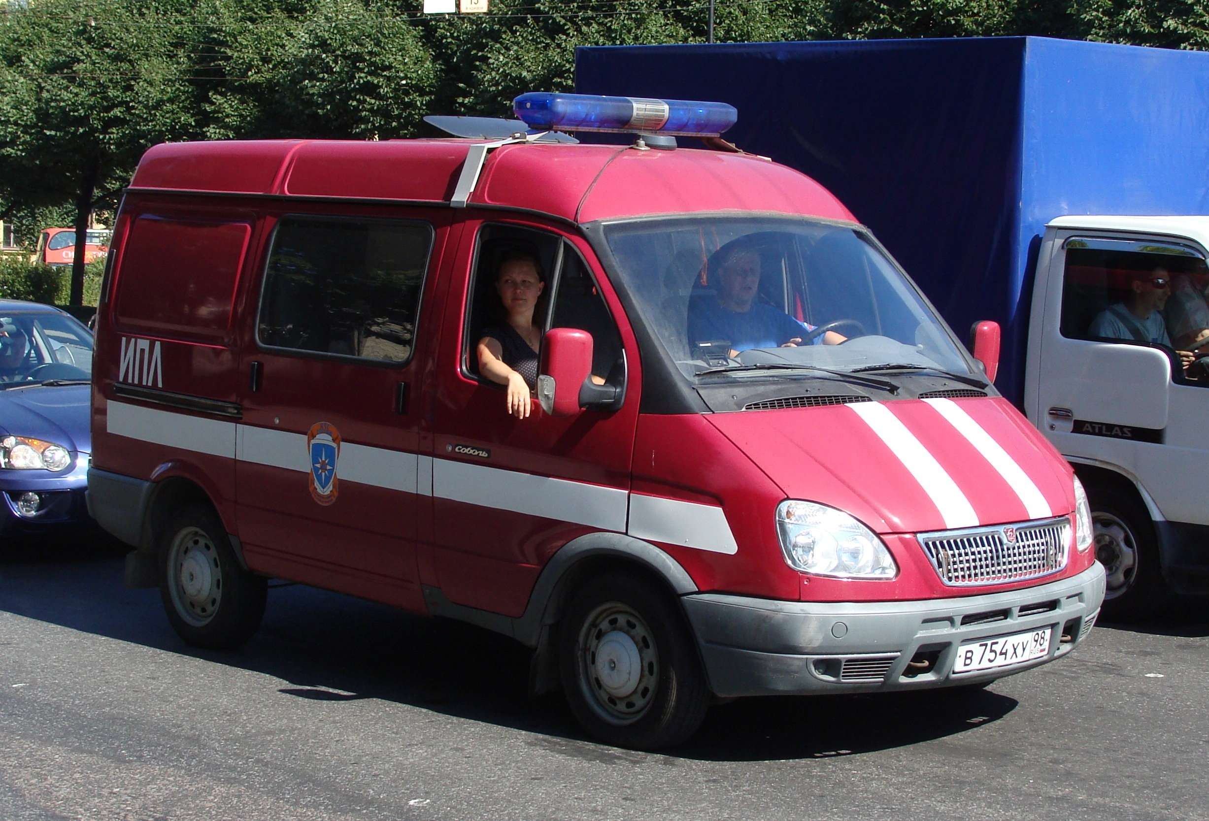 Испытательная пожарная лаборатория, Санкт-Петербург